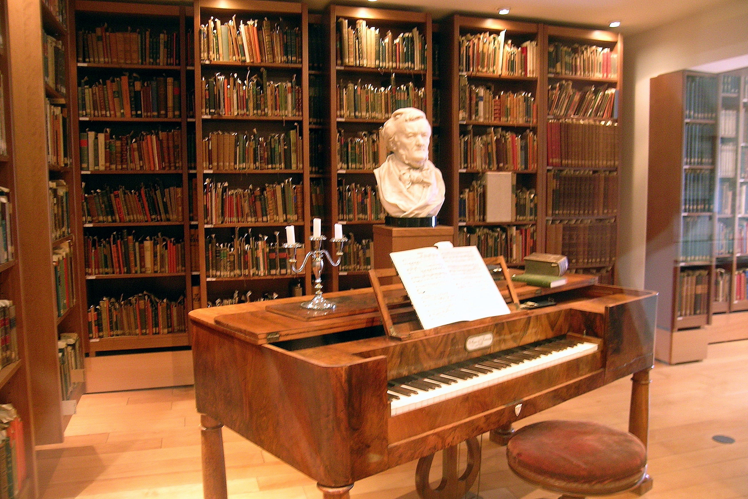 Wagnerraum mit Oesterlein Bibliothek